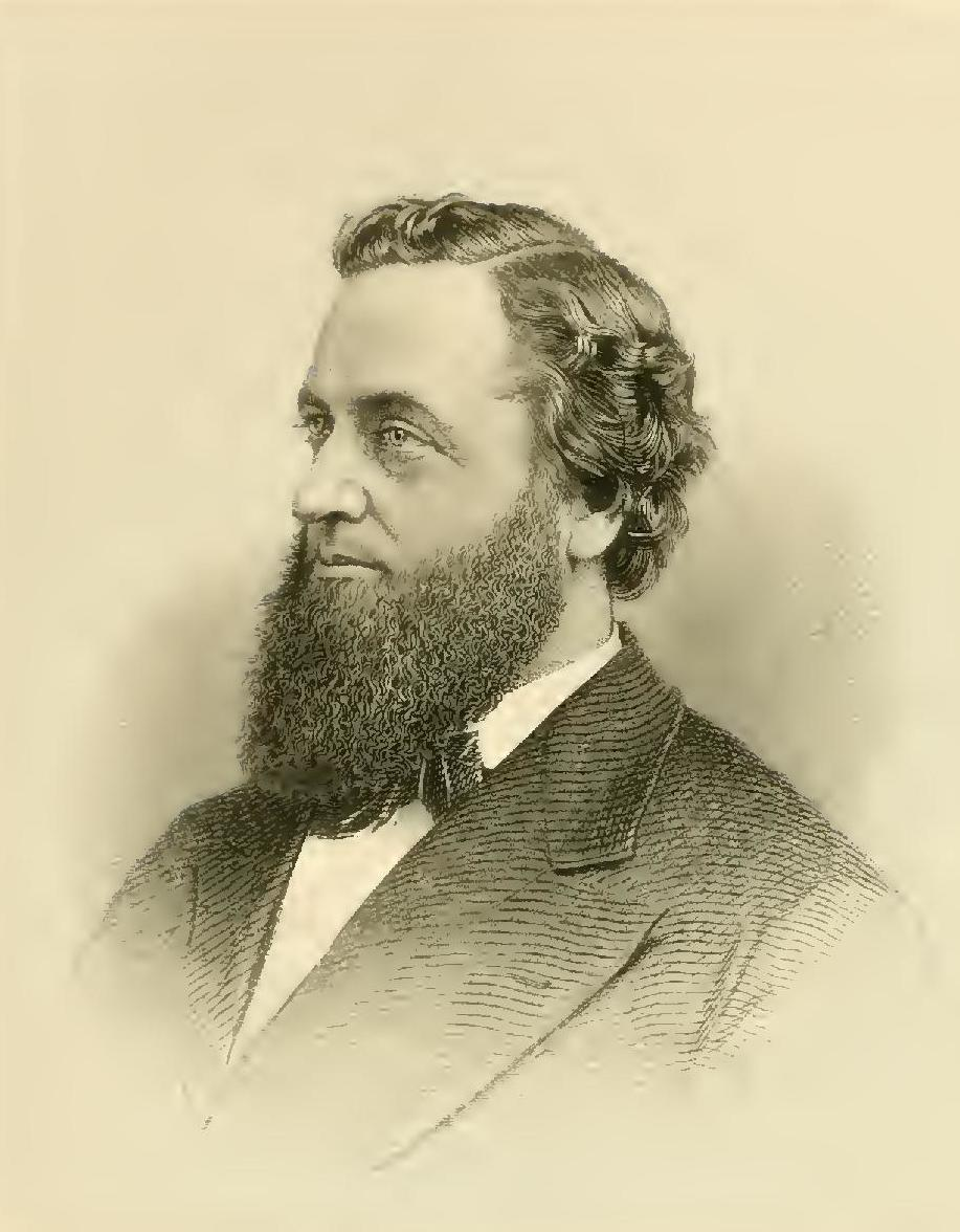 Martin Van Buren Edgerly